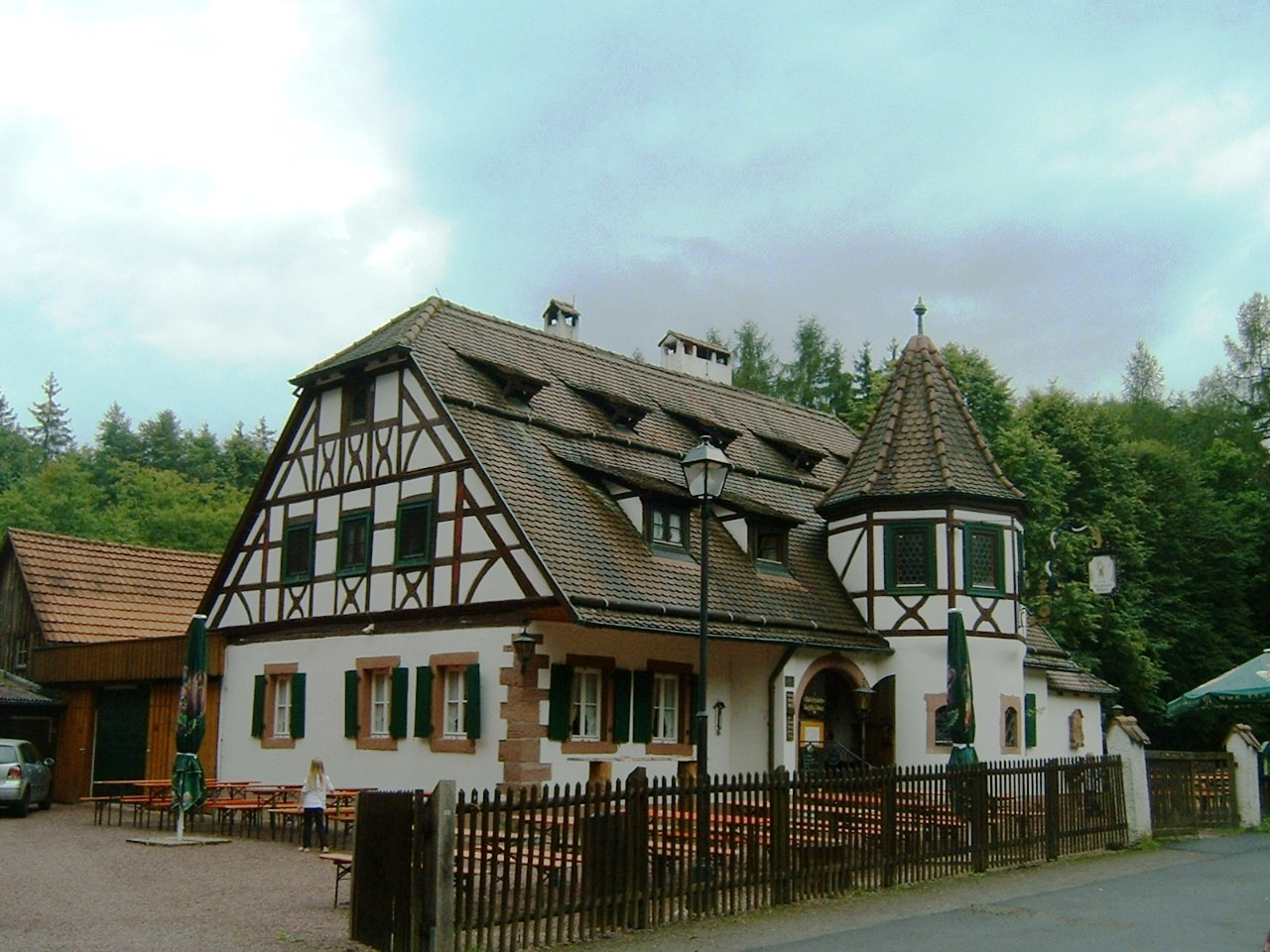 Bayrische Schanz, ehemalige Zollstation, später Forsthaus, jetzt Waldgasthof. Gehört zu Ruppertshütten im Spessart.